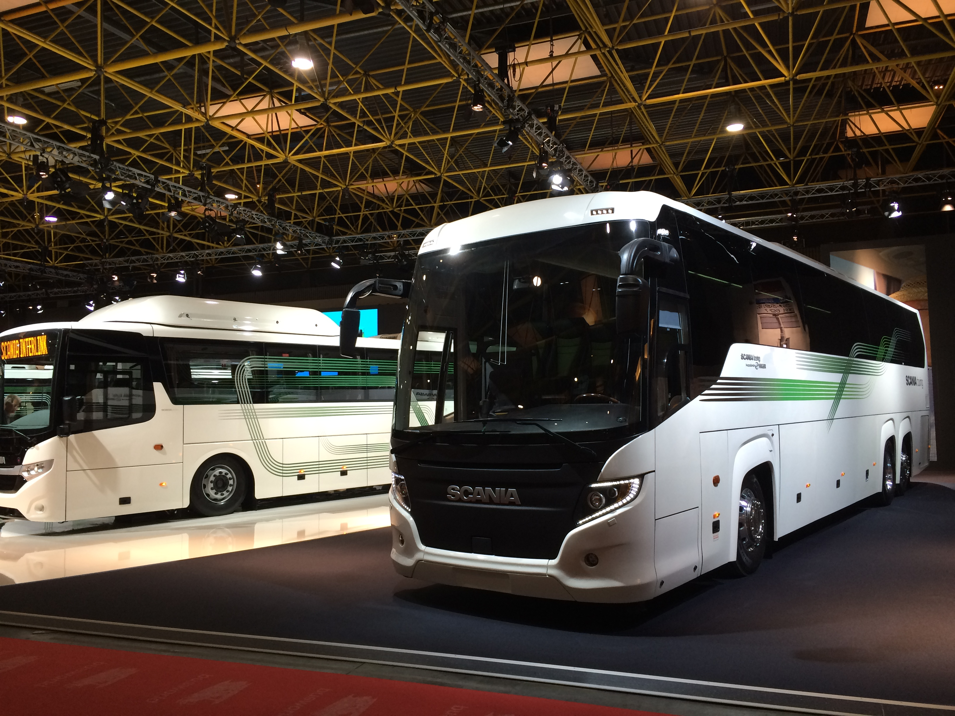 Scania Touring at Busworld in Kortrijk 2015